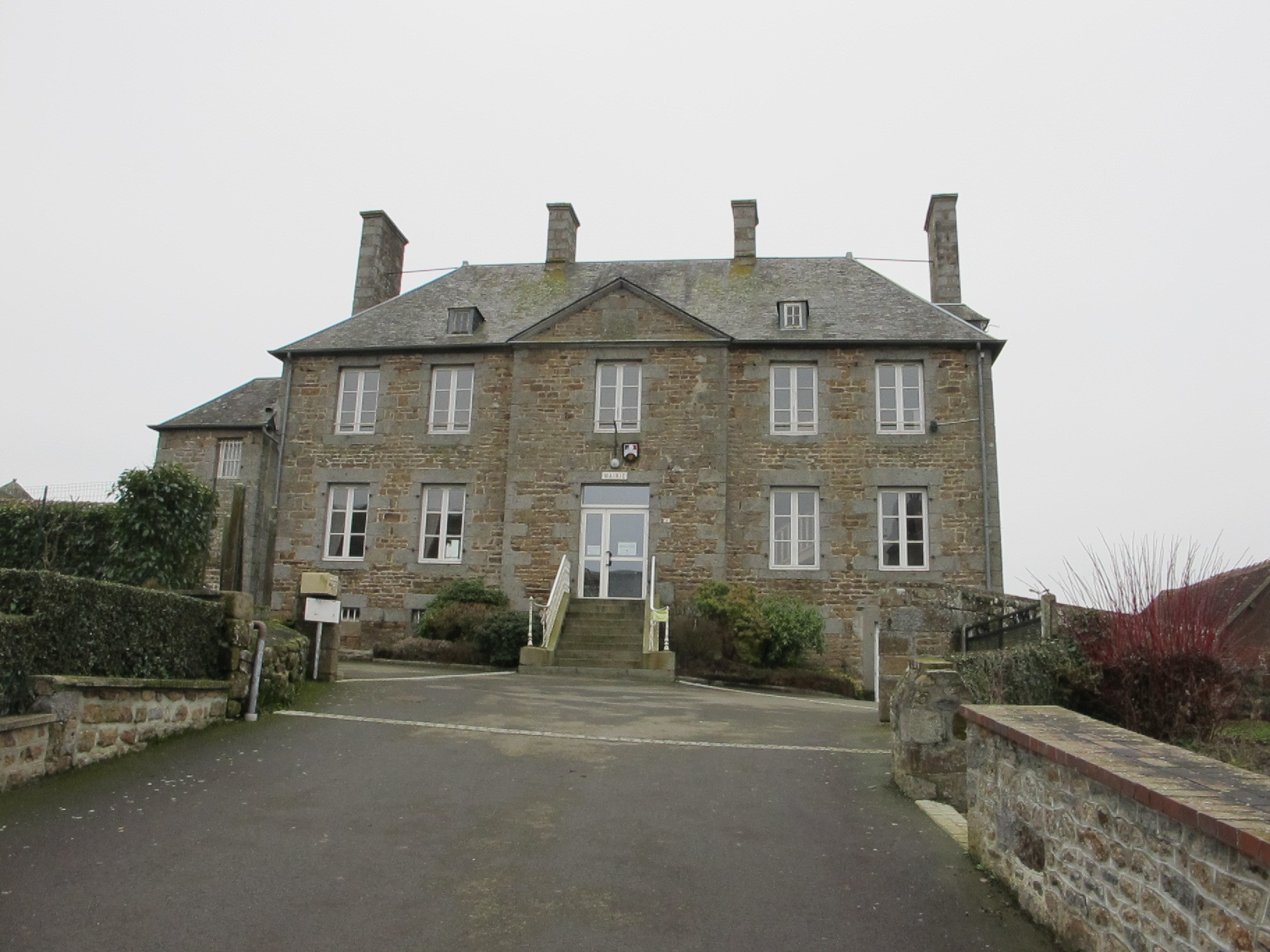 Mairie de Saint-Honorine-La-Chardonne